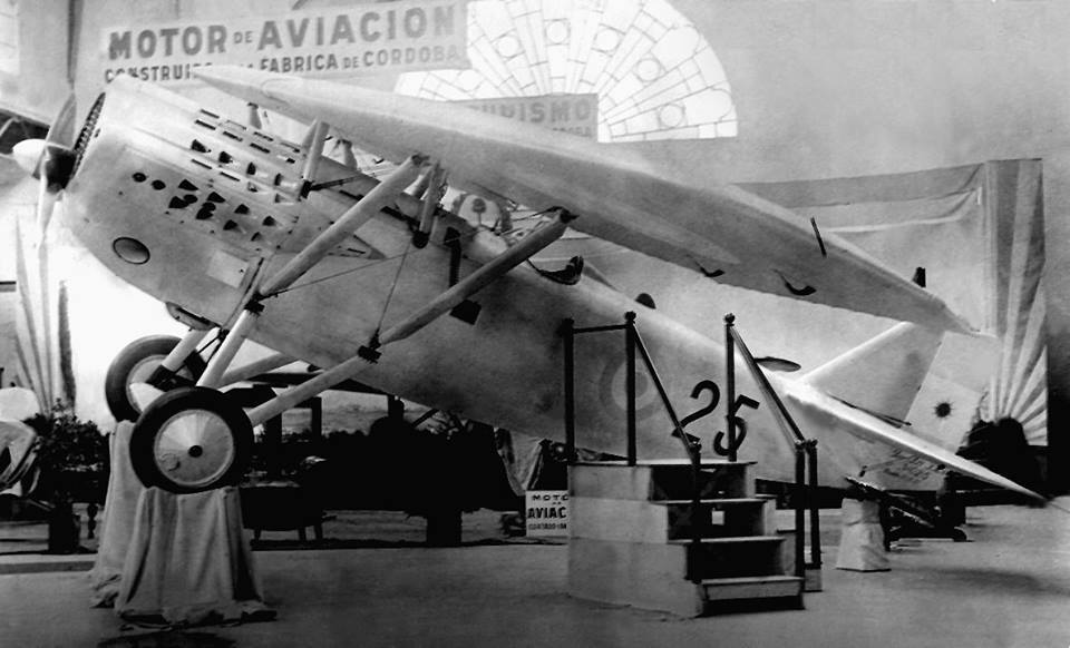 El 15 de octubre de 1930, el avión Dewoitine tipo D. 21 vuela por primera vez. Se trata de un monoplano metálico monoplaza de caza, con motor Lorraine Dietrich de 450 hp. Se construyeron bajo licencia 32 unidades en la Fábrica Militar de Aviones. El piloto en esa oportunidad fue el sargento José H. Rodríguez.